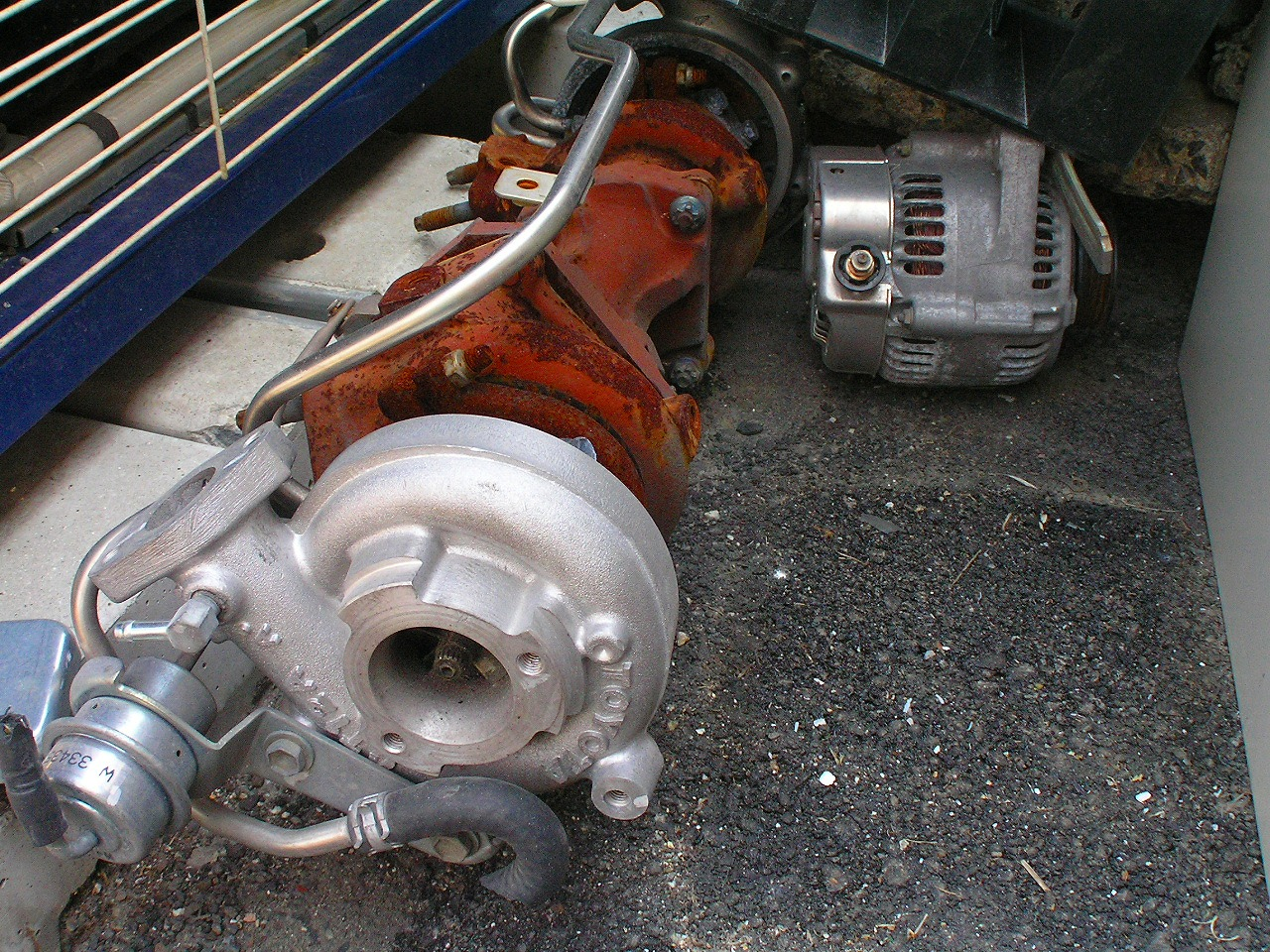 ツインカムターボTOYOTAマークⅡ